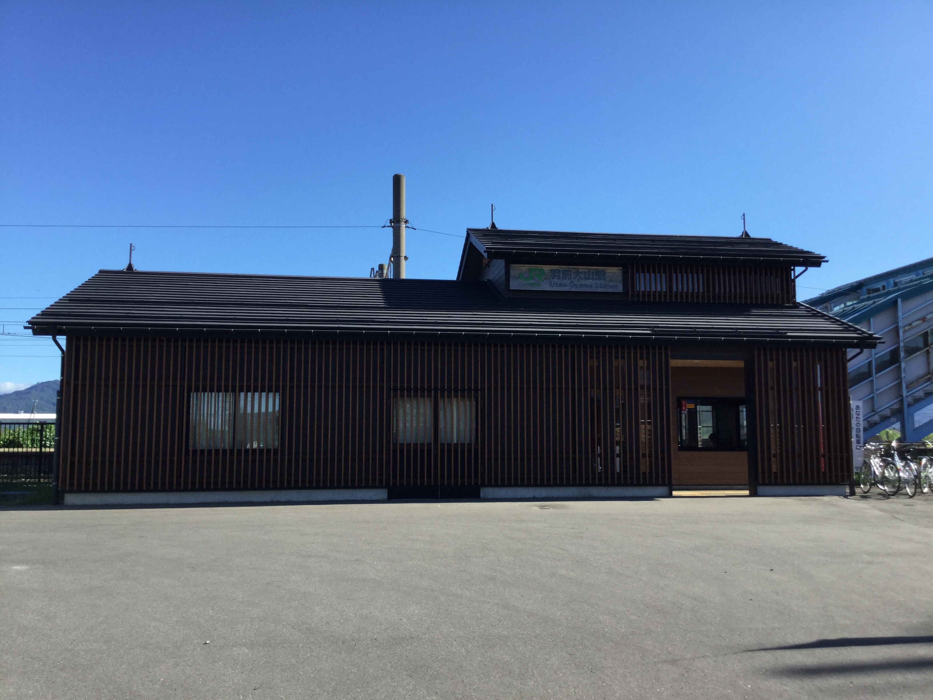 羽前大山駅駅舎